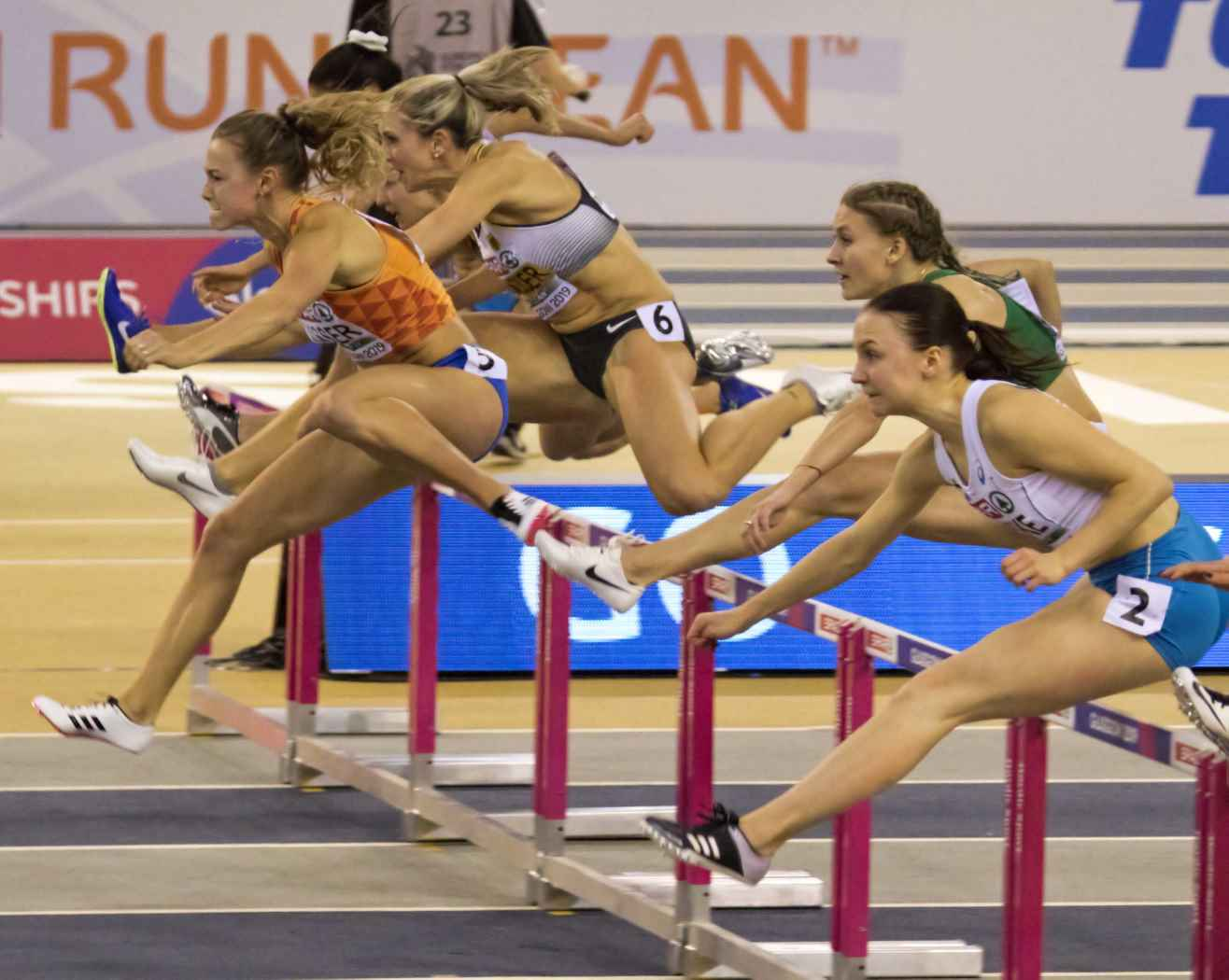 EKI30240 finale 60mH dames visser